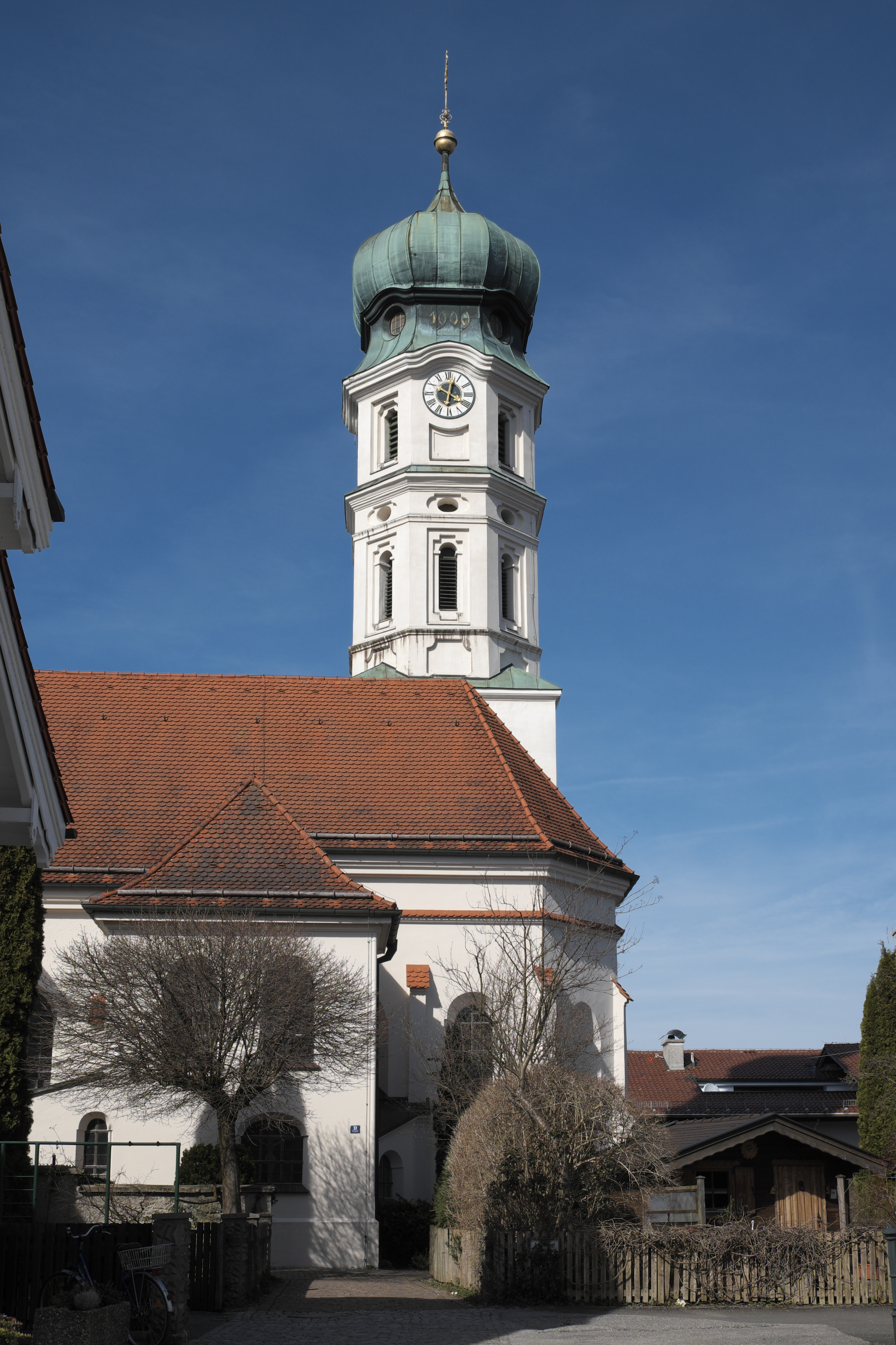 Katholische Pfarrkirche St. Michael in Seeshaupt im Landkreis Weilheim-Schongau (Bayern/Deutschland